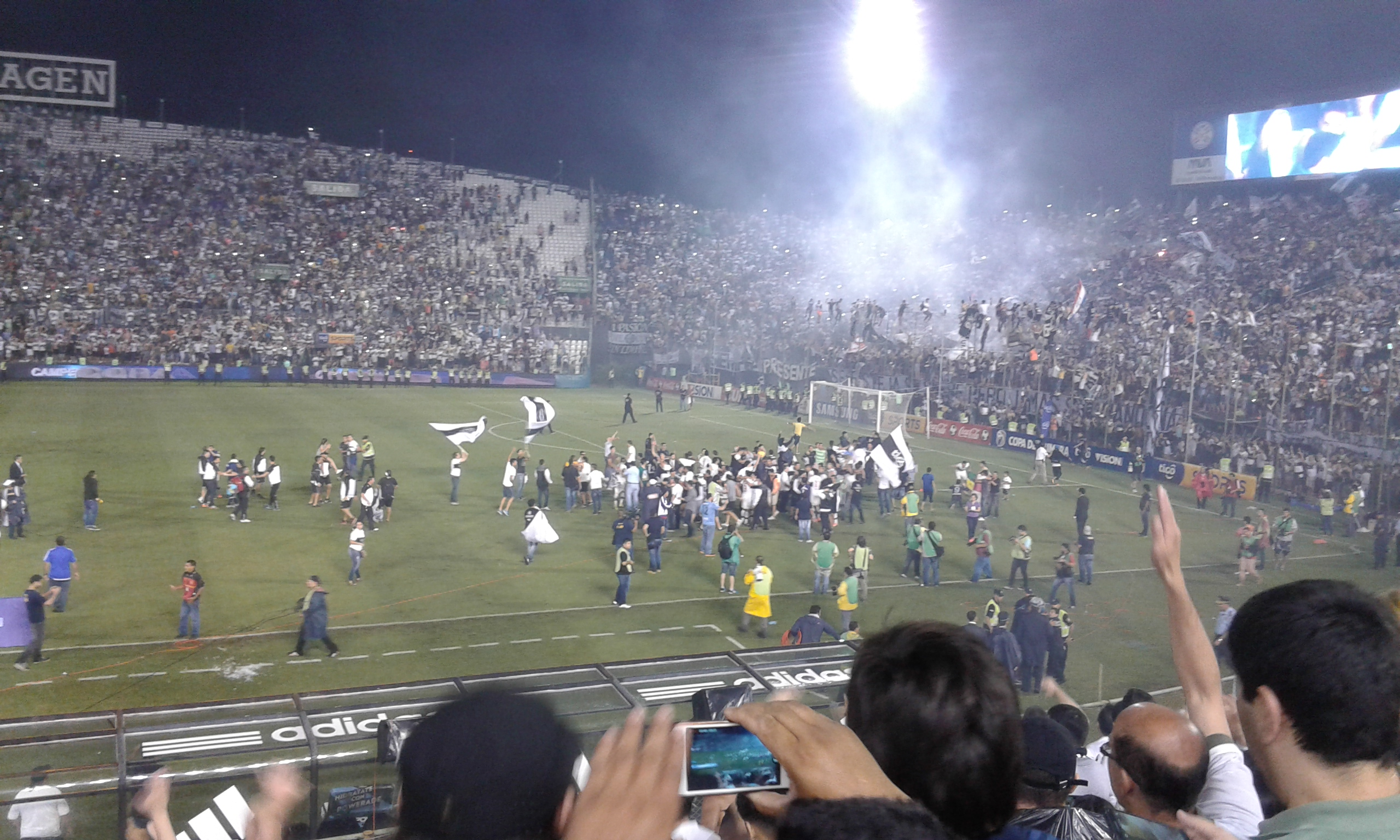 El Club Olimpia de Paraguay se consagró campeón del torneo Clausura 2015 de fútbol frente a Cerro Porteño, el miércoles 9 de diciembre de 2015, por el partido extra (finalísima) disputado en el estadio Defensores del Chaco. El título representó el número 40 en su palmarés a nivel local.